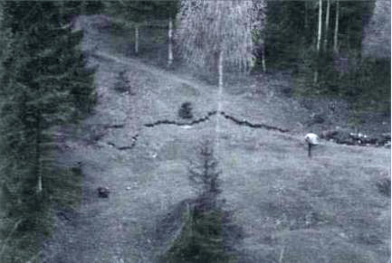 La frana del monte Toc del 1960